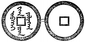 天命汗钱钱币图样，出自刊于1895年的《Currency of the farther East》（远东古钱币）第二卷，该书作者为十九世纪末在香港任职的J.H. Stewart Lockhart（骆克）。“天命汗钱”钱是后金首任君主努尔哈赤在位的天命年间铸行的货币。